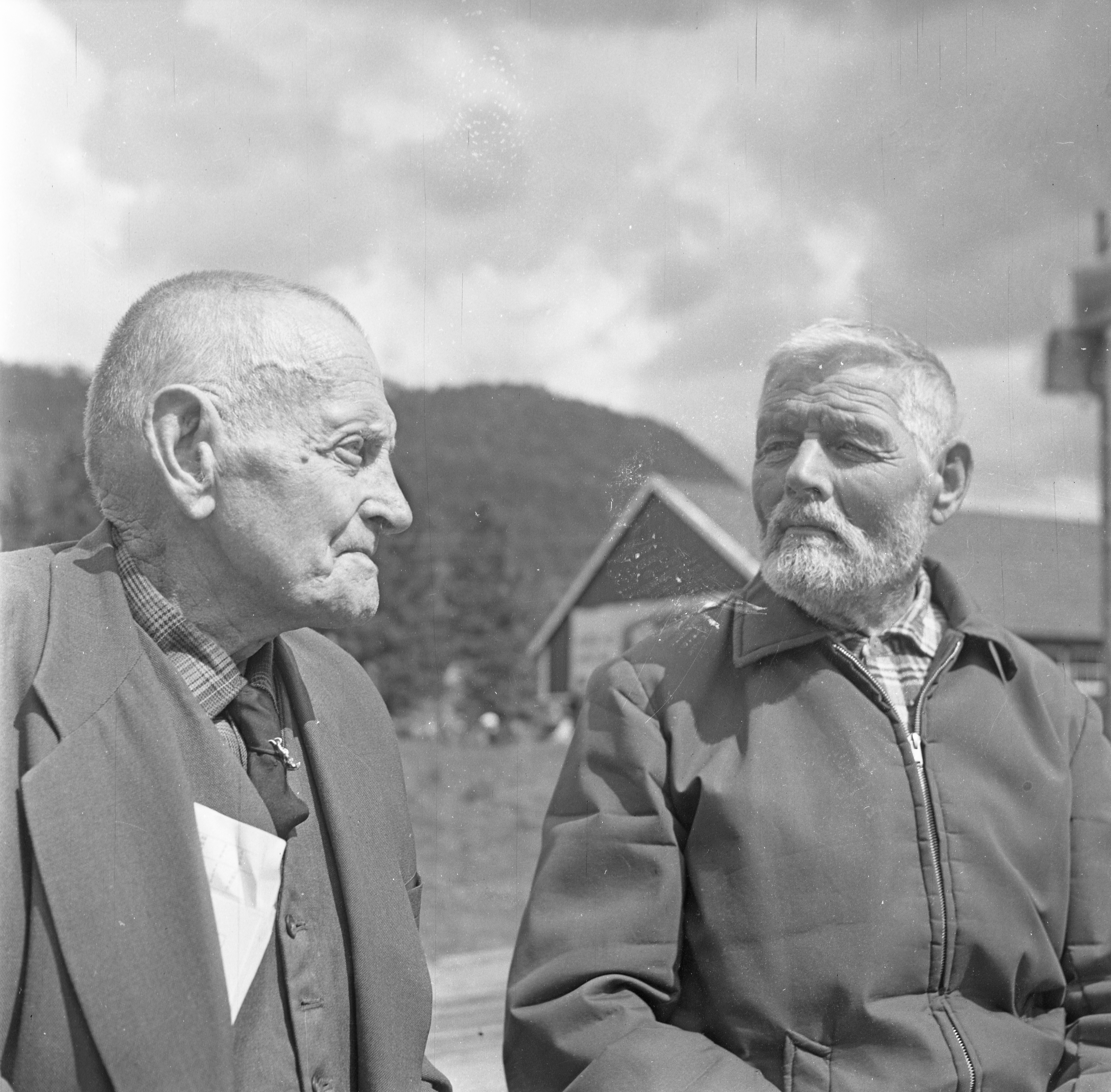 Format: Negativ 120 film Dato / Date: 5 Juli 1967 Fotograf / Photographer: Eirik Sundvor (1902 - 1992) Sted / Place: Ulven ved Bergen (?) Wikipedia: Rasmus R. Skjerpe (1882 - 1976) Wikipedia: Skytterkonge Lenke / Link: Det frivillige Skyttervesen (dfs.no) Eier / Owner Institution: Trondheim byarkiv, The Municipal Archives of Trondheim Arkivreferanse / Archive reference: Tor.H43.Bxx.F14414 Merknad: Rasmus Skjerpe ble skytterkonge i 1923. Martin Saur fra Egge Skytterlag fikk mesterskapsmedalje ved Landsskytterstevnet i 1932.